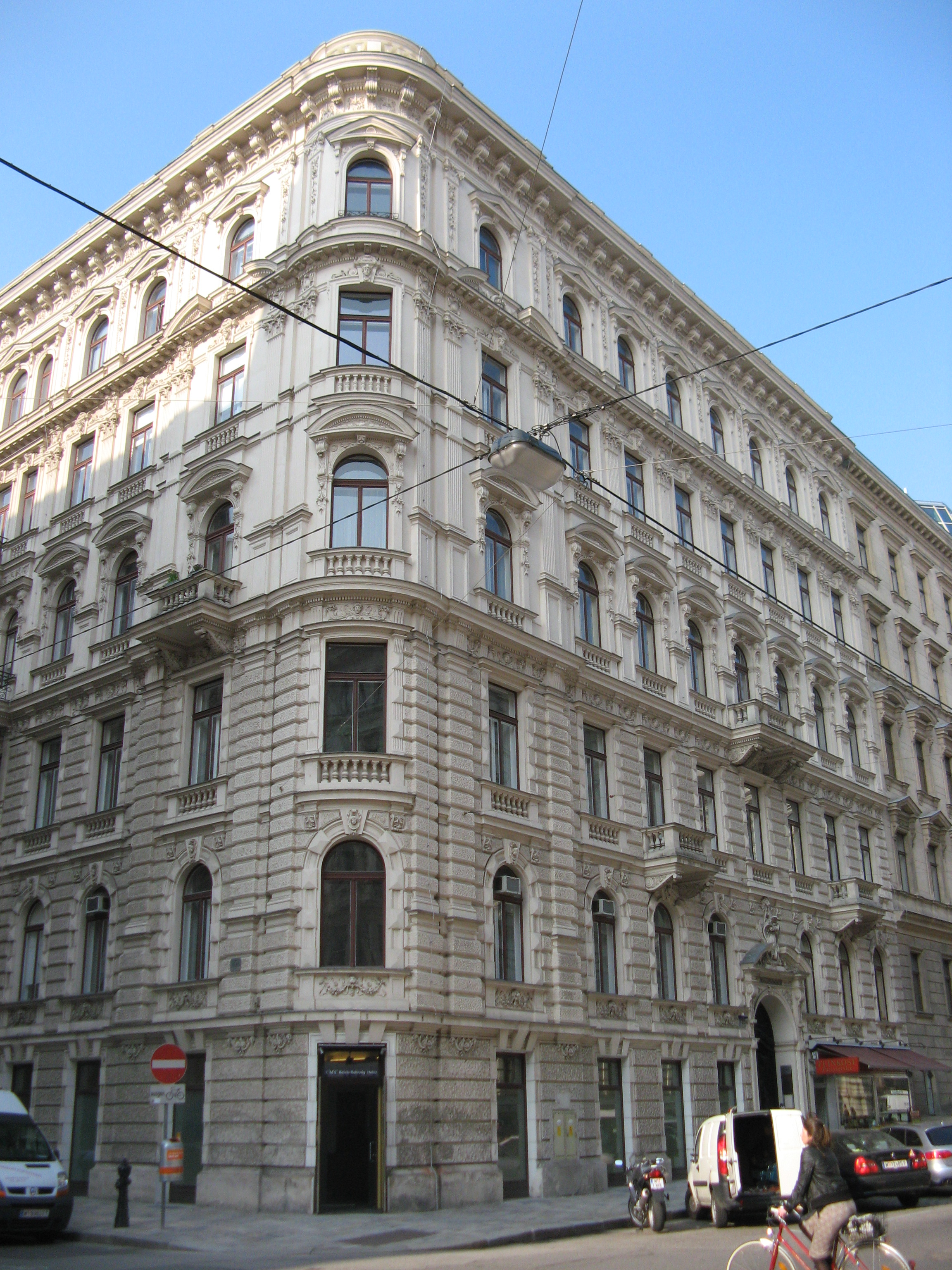 Ehemaliges Haus Sternberg (1890-91) von Carl Stephann, Grillparzerstraße 5, Wien-Innere Stadt